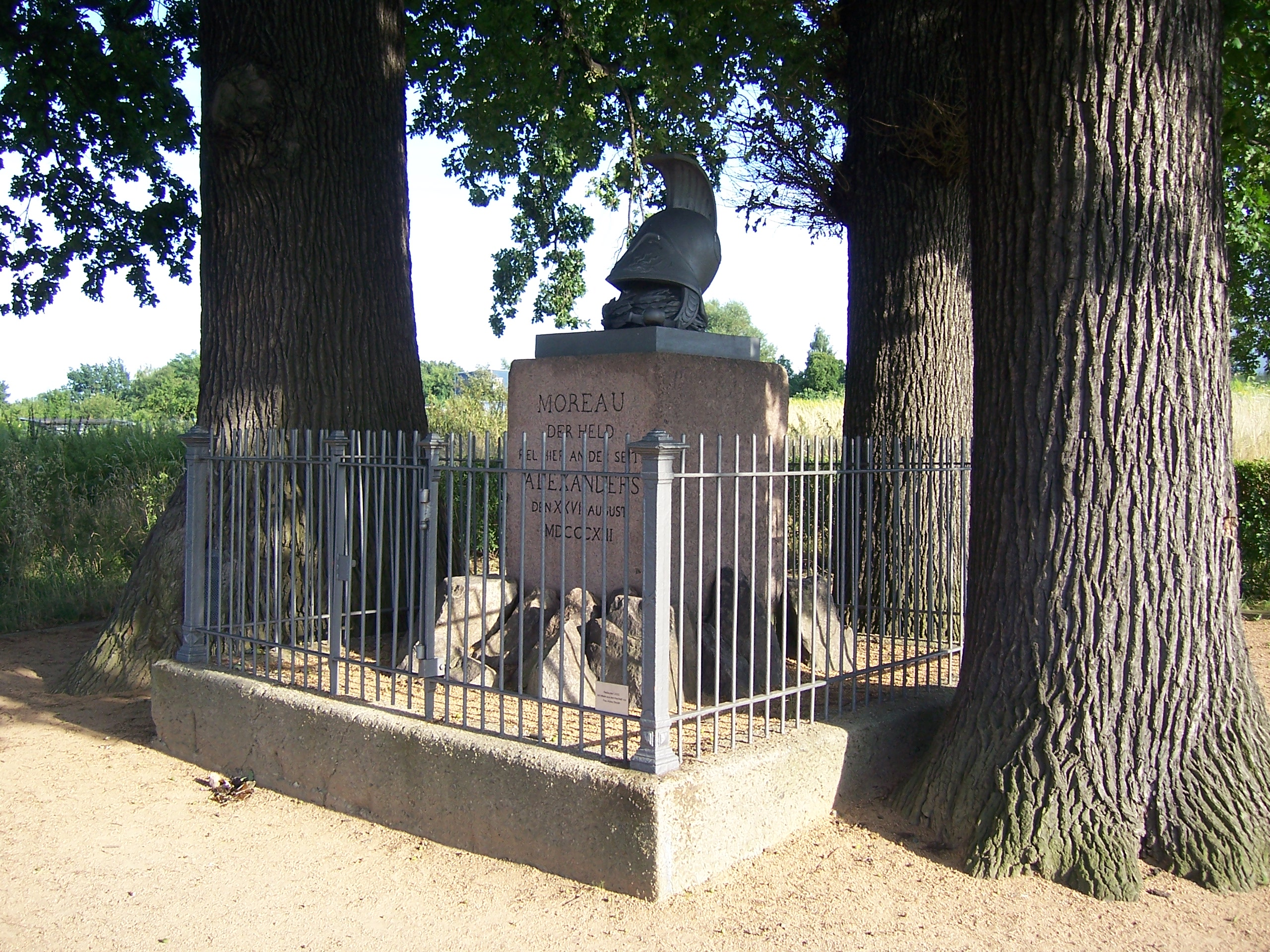 Moreau-Denkmal auf der Räcknitzhöhe in Dresden